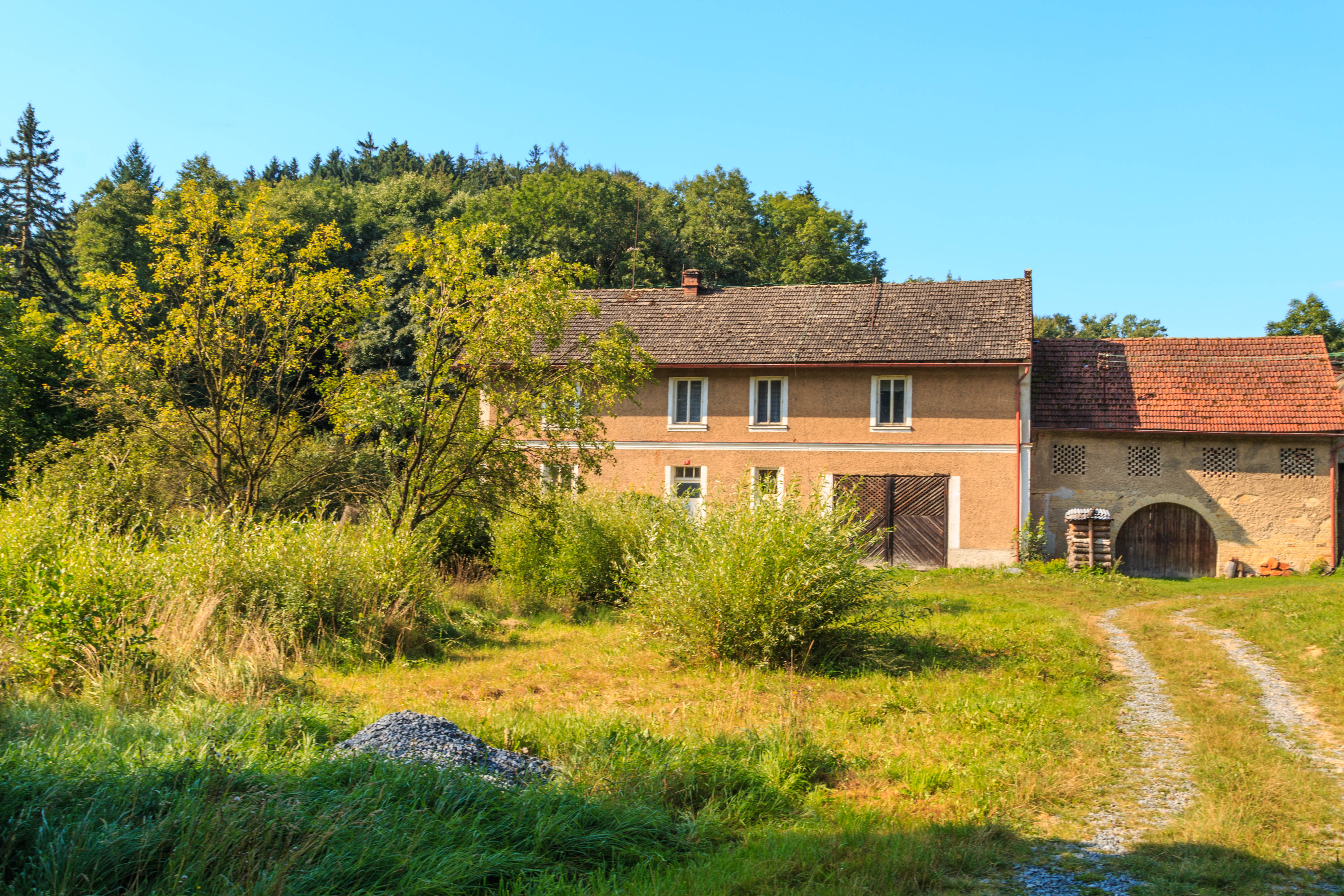 Dolany u Mokré Lhoty - čp. 1